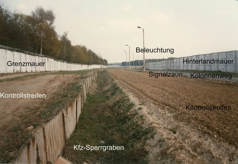 Die Maueranlagen zwischen Berlin-Lichtenrade (links) und Mahlow (rechts). Die Einzelheiten ergeben sich aus der Beschriftung.